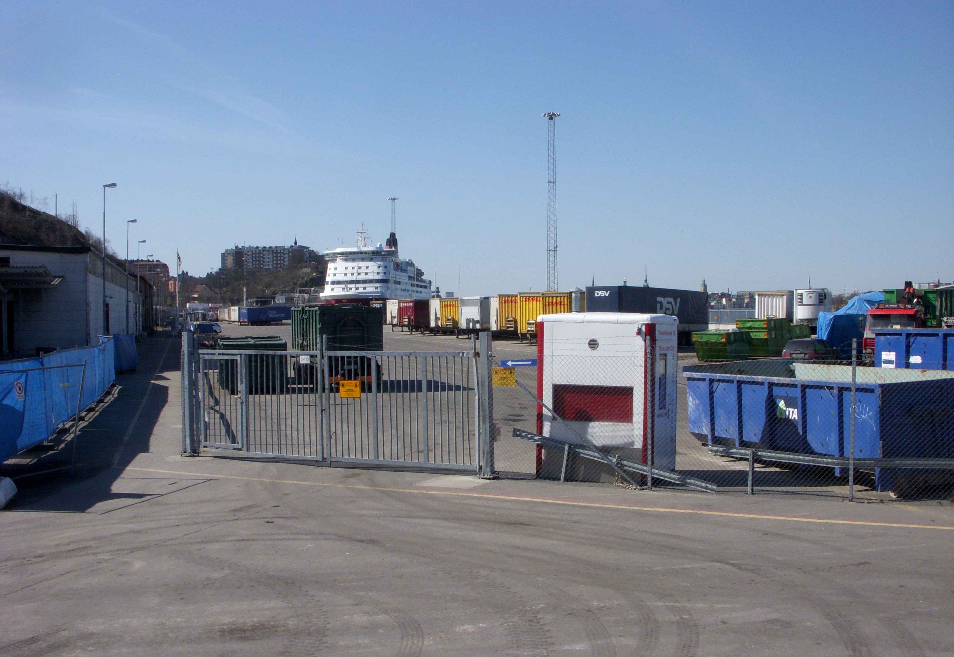 Yttre Masthamnen på Södermalm, Stockholm